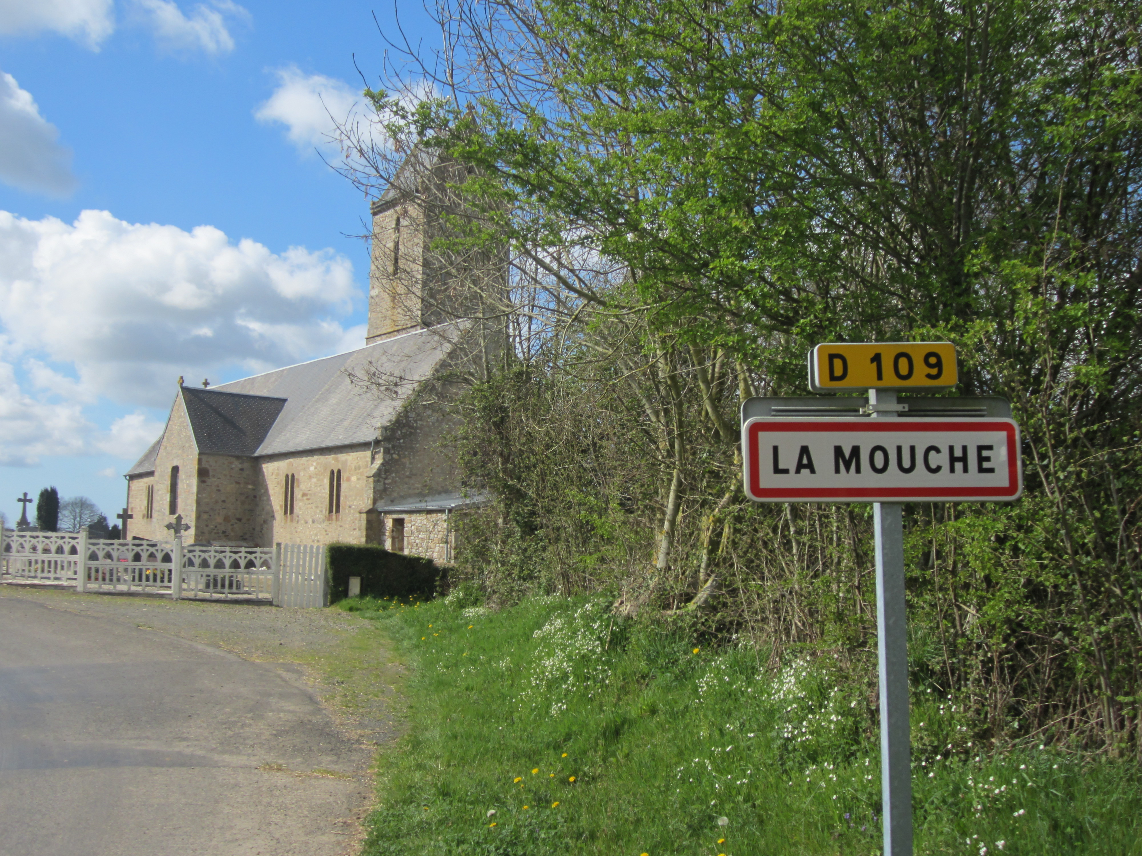 La Mouche, Manche